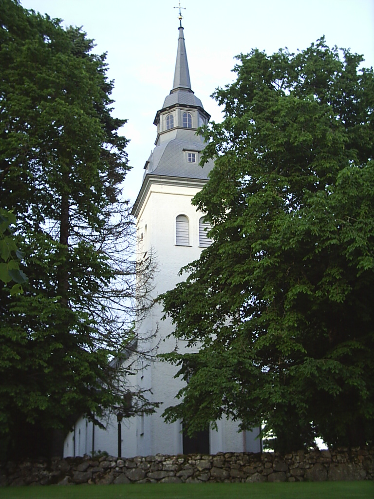 Kyrkan i Hjärtums församling, Lilla Edets kommun. Fotograf: Tubaist